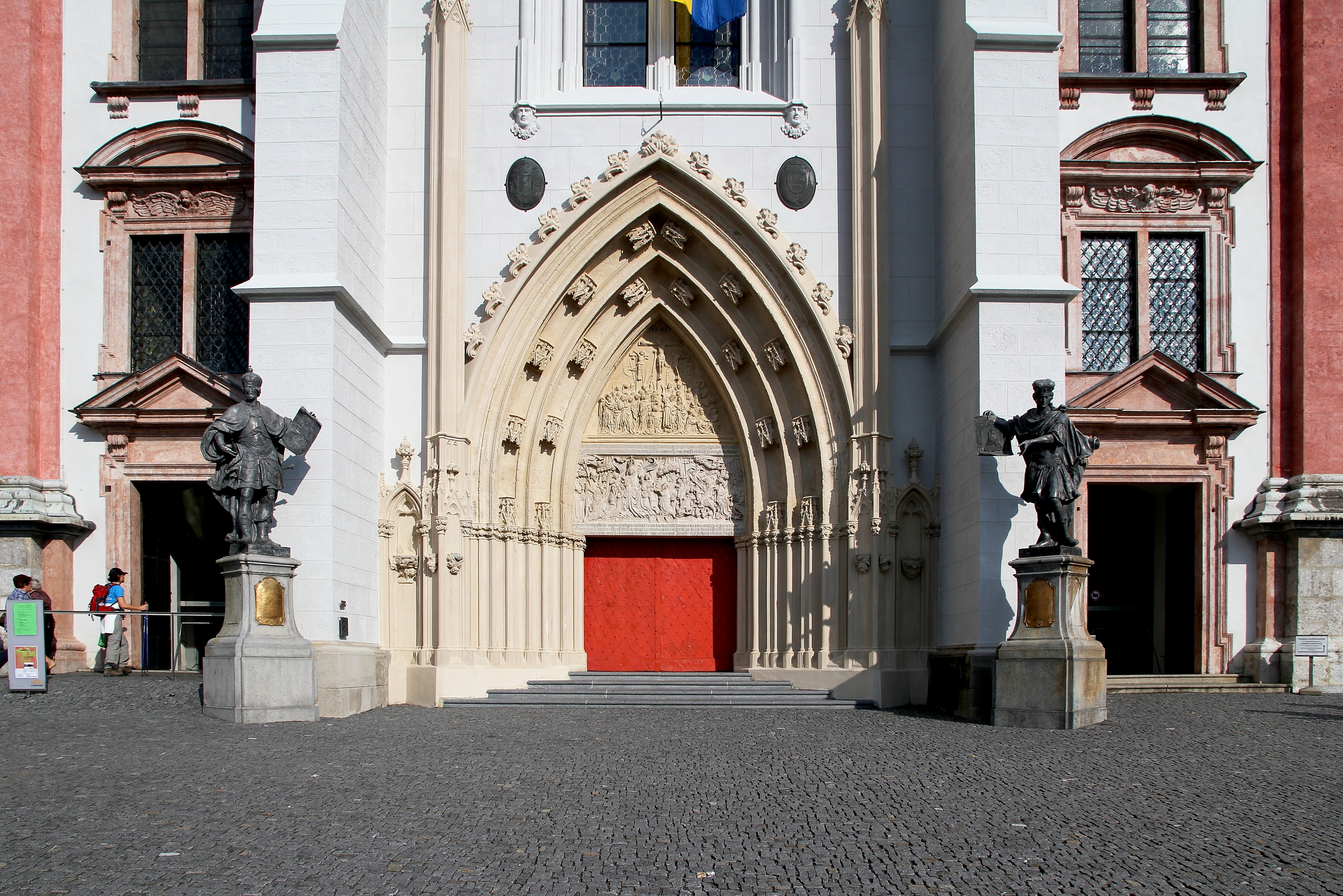 Das Hauptportal der Basilika, Pfarr- und Wallfahrtskirche Maria Geburt in der obersteirischen Stadt Mariazell.